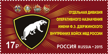 Отдельная дивизия оперативного назначения имени Ф.Э.Дзержинского внутренних войск МВД России